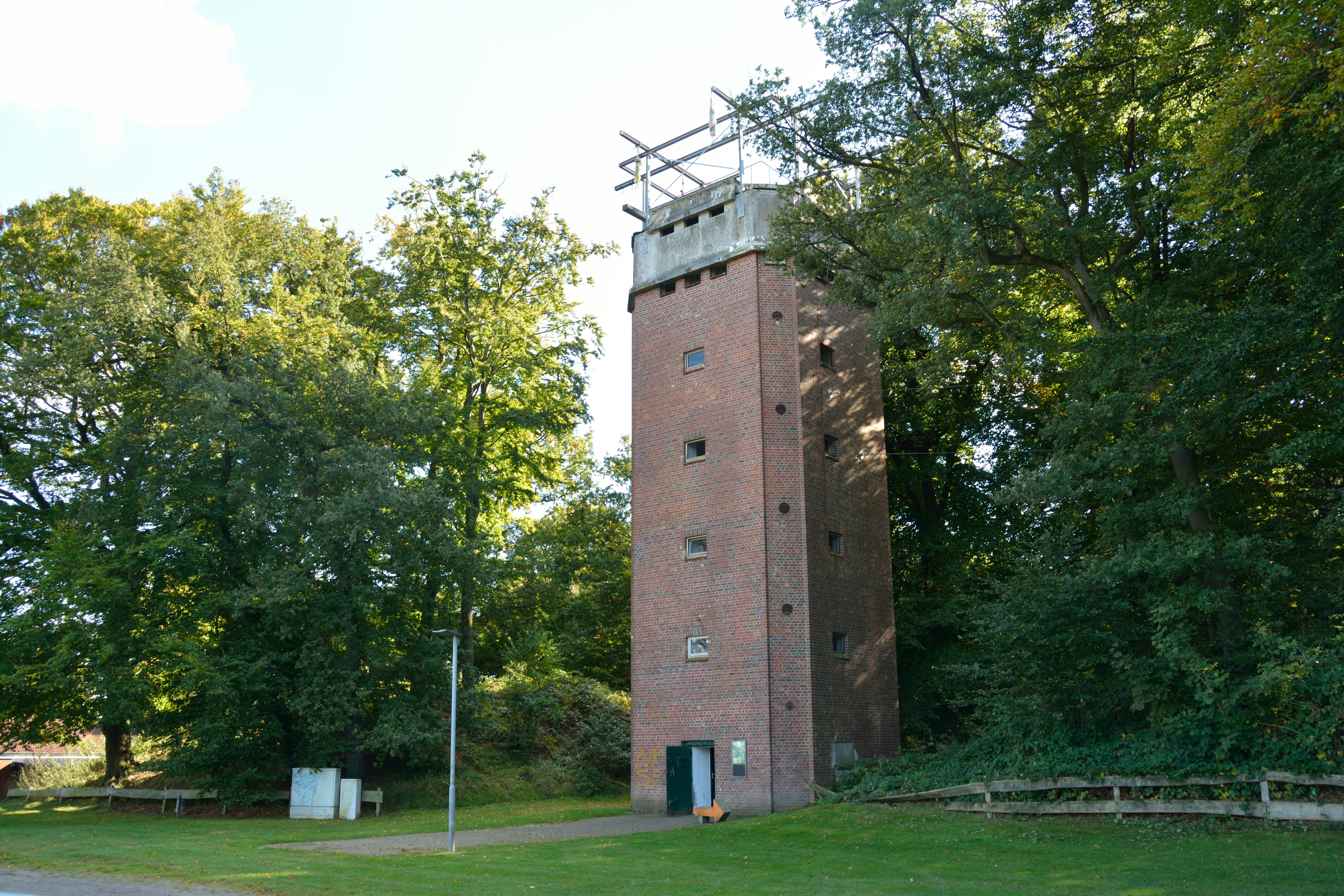 Das Hügelgräberfeld "Hademarscher Berge" liegt in Hanerau-Hademarschen direkt an den Sportplätzen. Von den ehemals bekannten 30 Grabhügeln sind heute noch fünf erkennbar. Ein Hügel wurde bisher geöffnet, das Grab ist der Öffentlichkeit zugänglich. Zwischen zwei Hügeln wurde während der Nazi-Diktatur in Deutschland ein Flakturm errichtet, er dient heute als Ausgangspunkt für einen Klettergarten im Wald Der Flakturm, links davon der geöffnete Grabhügel.